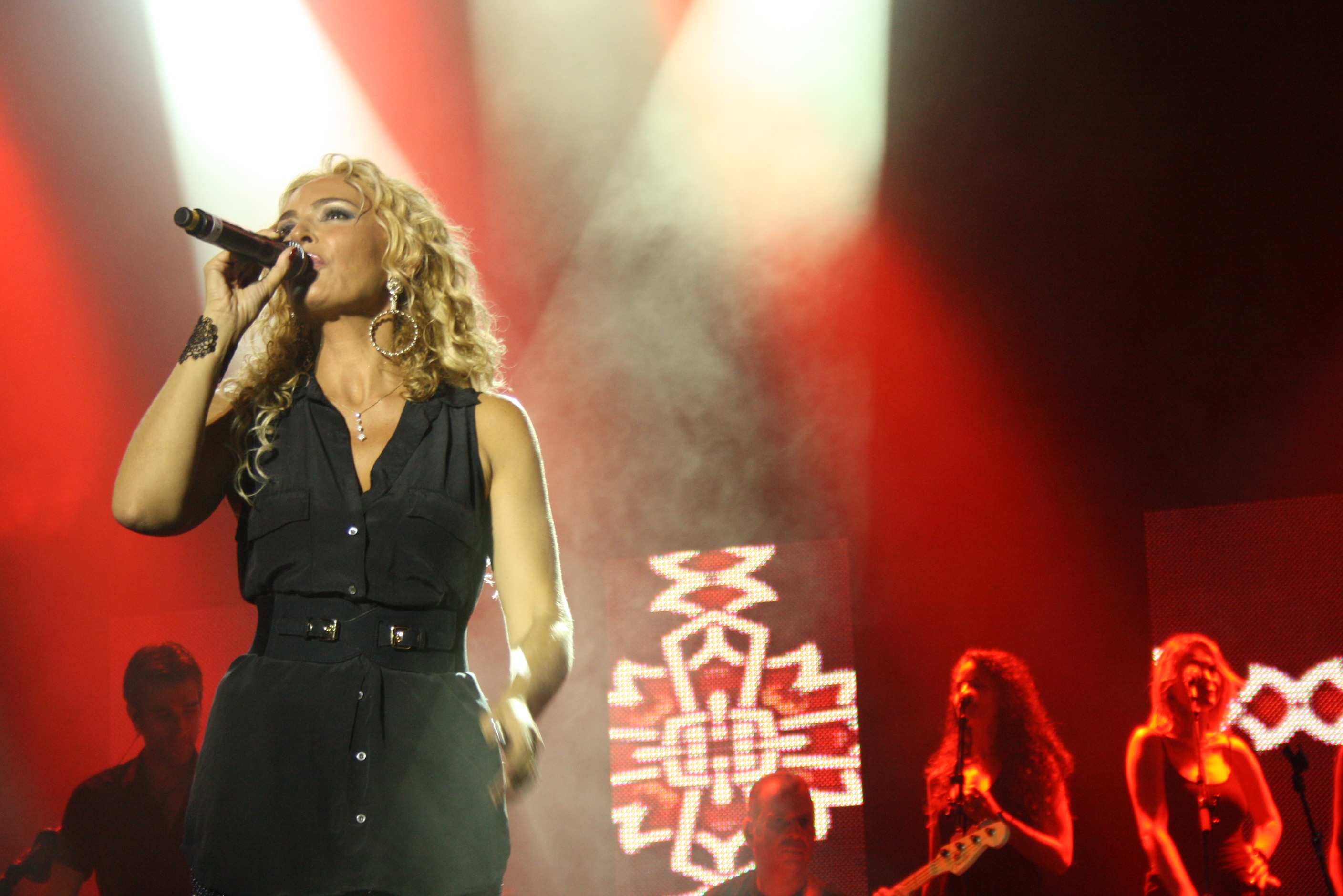 ishtar, briza festival in ashqelon, 2010